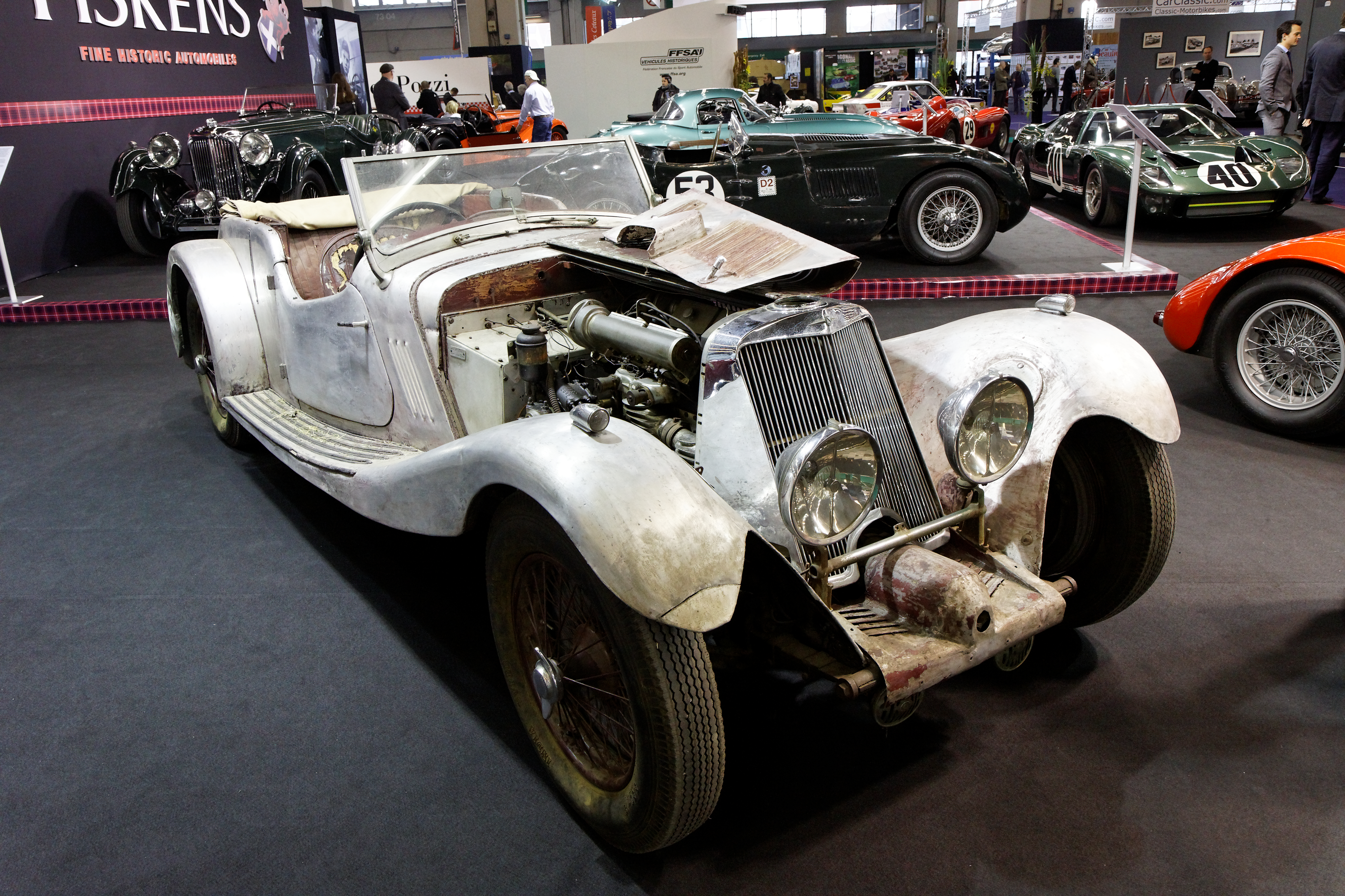 Photographie prise lors du salon rétromobile 2011 à Paris, porte de Versailles.